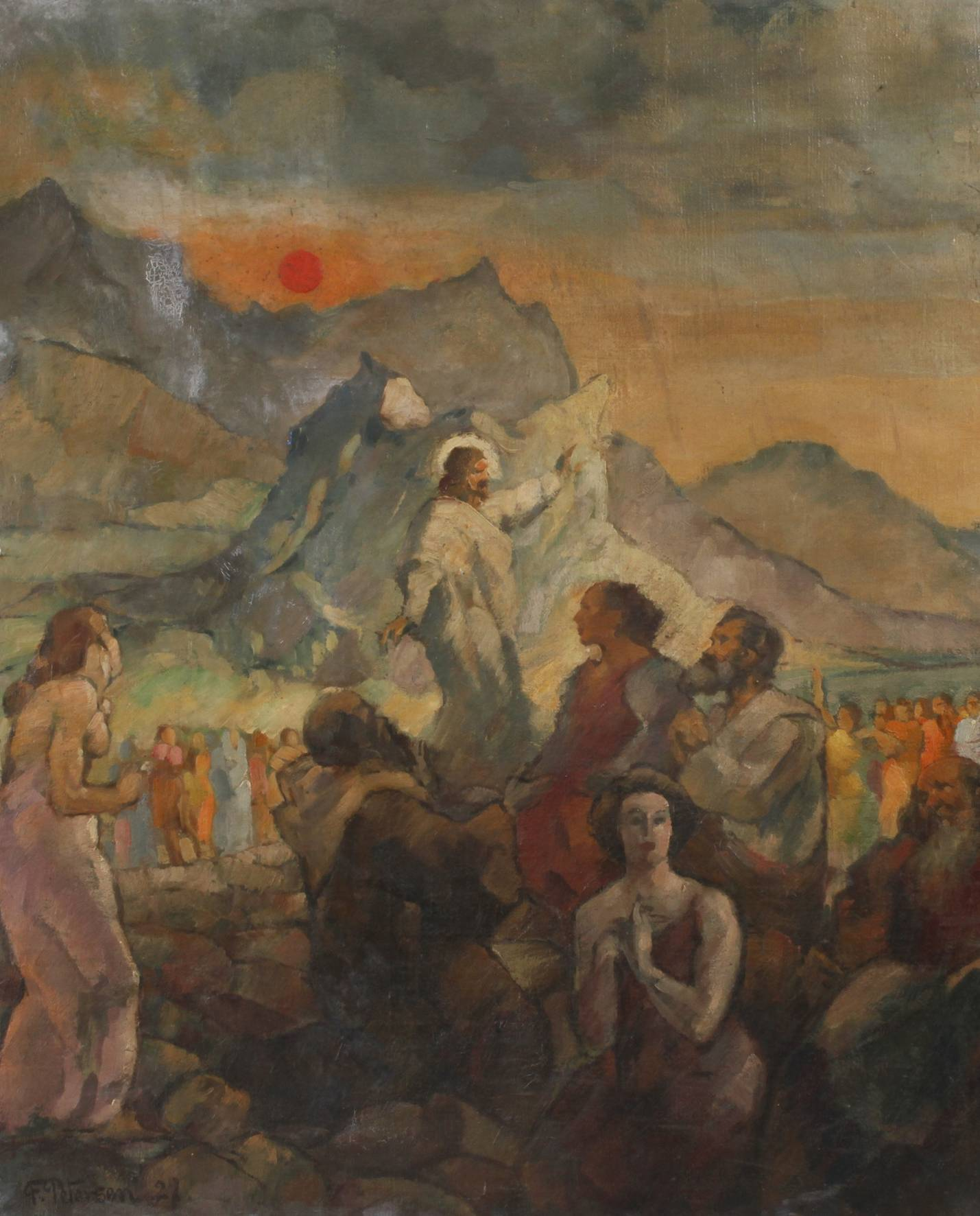 Friedrich Petersen - Bergpredigt, 1927